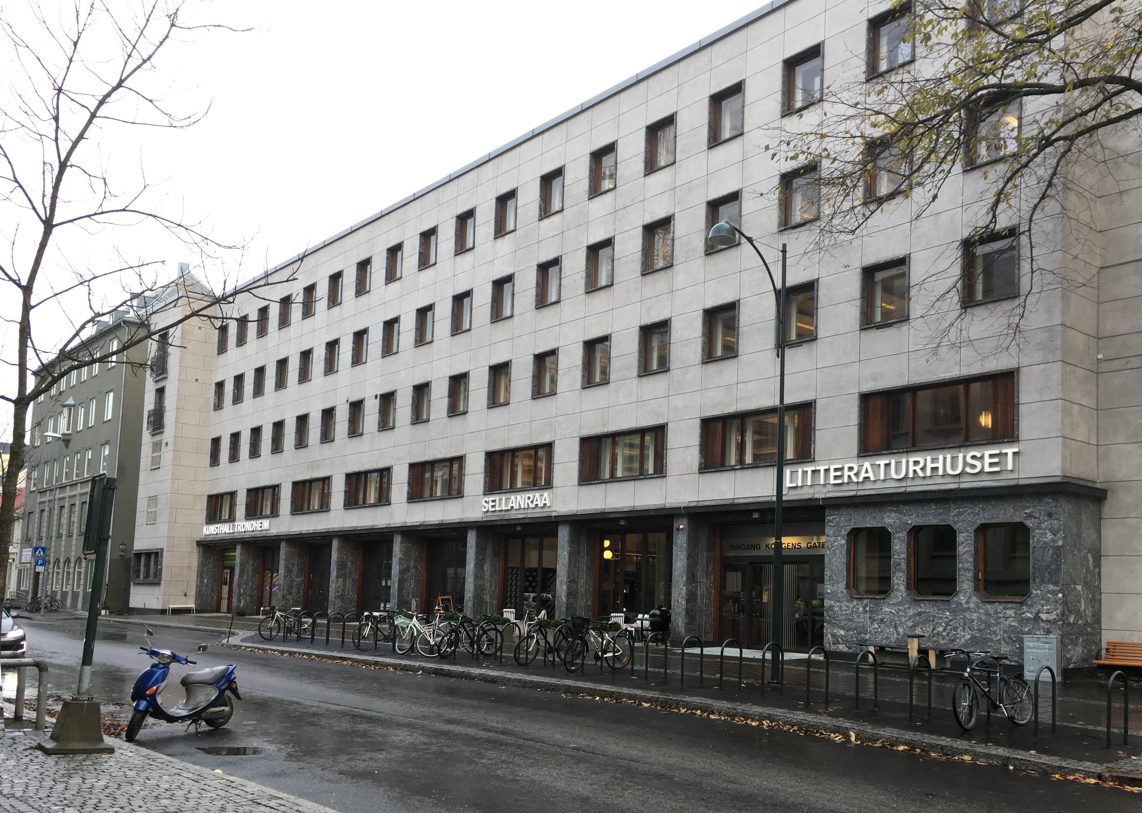 Kongens gate 2, Trondheim. Fasade mot Søndre gate. Bygningen er tegnet av arkitekt Axel Guldahl d.e. Den huset opprinnelig byens hovedbrannstasjon, men er nå del av det såkalte kulturkvartalet, med fire uavhengige kulturaktører.